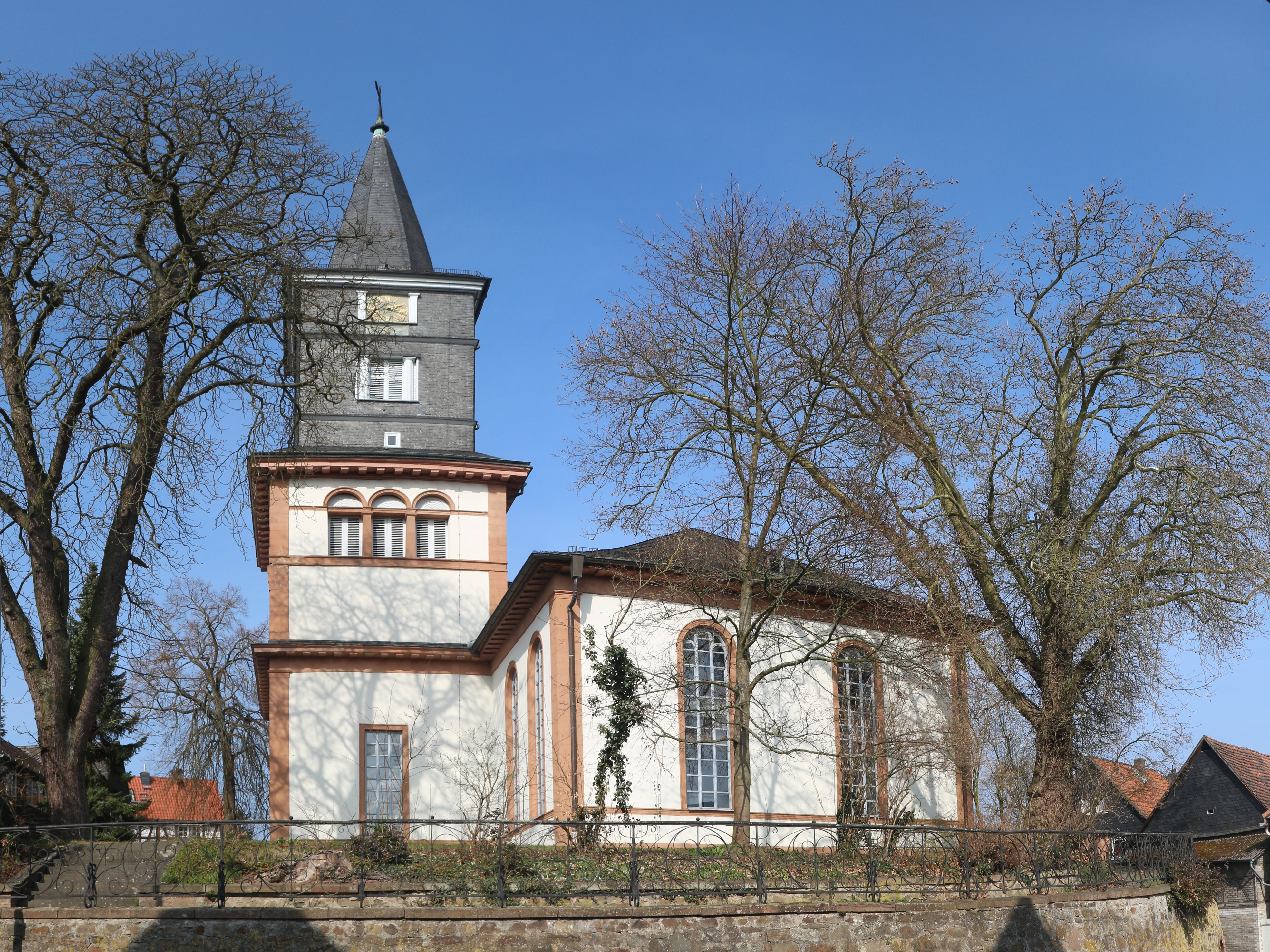 Ev. Pfarrkirche Wißmar